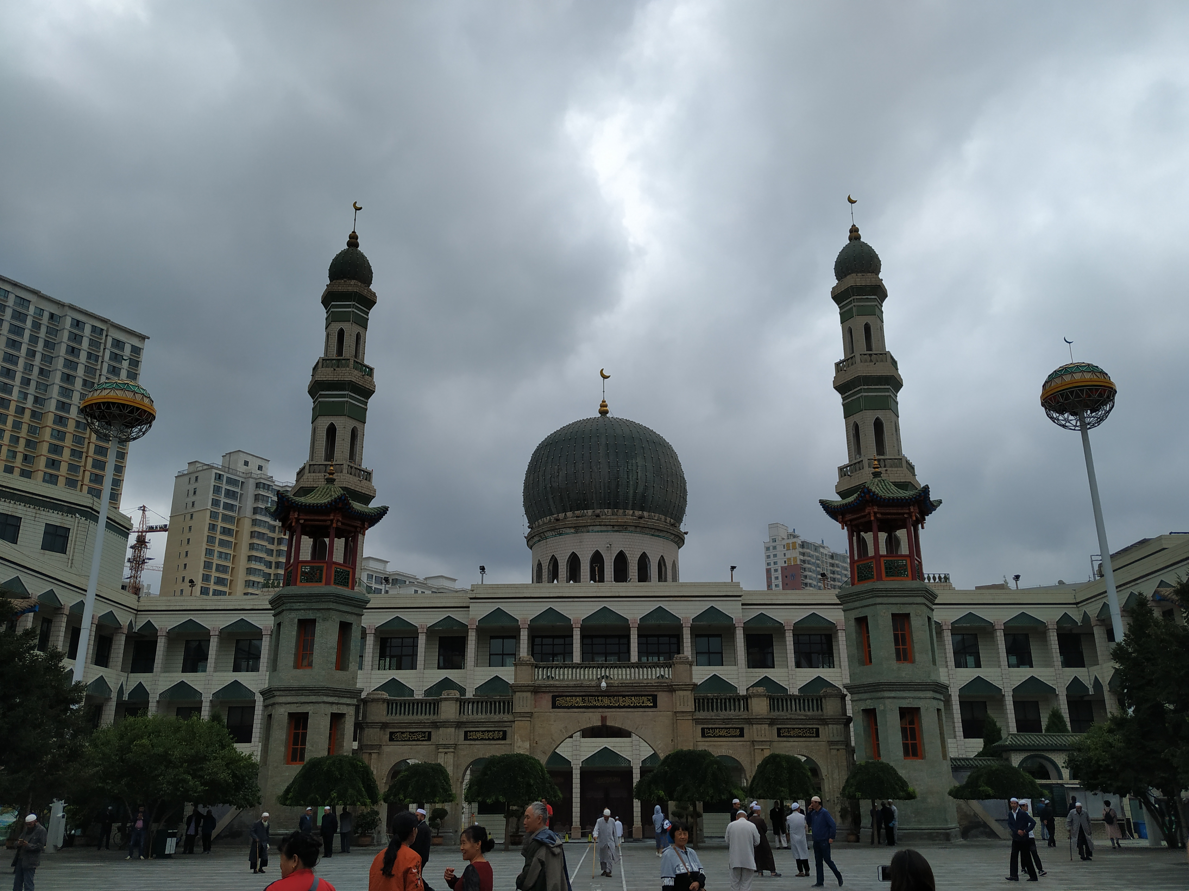 中文（中国大陆）: 西宁市东关清真大寺内广场拍摄